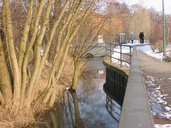 Potsdam-Drewitz, Kirchsteigfeld, Hirtengraben Fotografiert im März 2005 von Lienhard Schulz